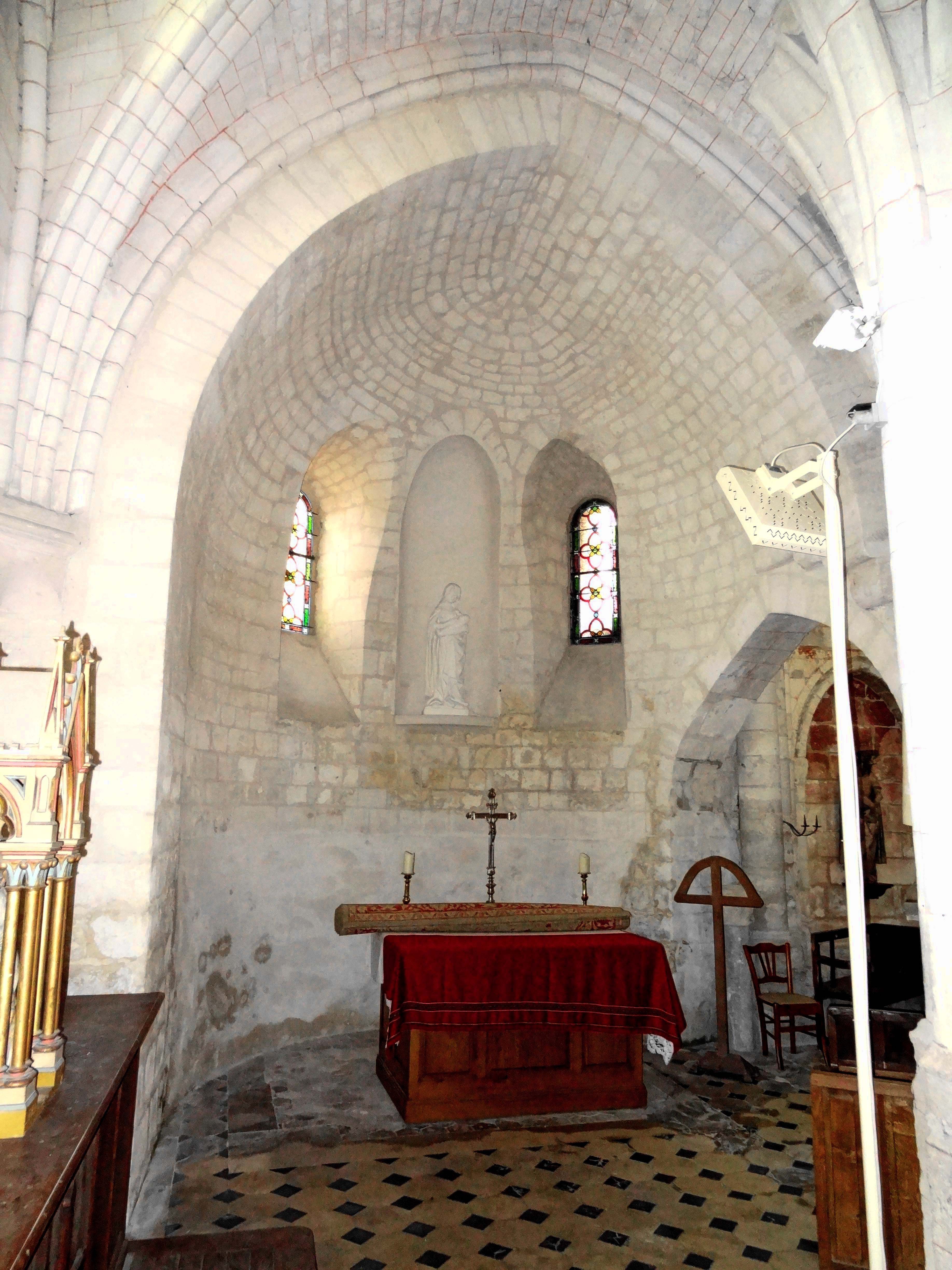 Intérieur de l'église - voir titre.